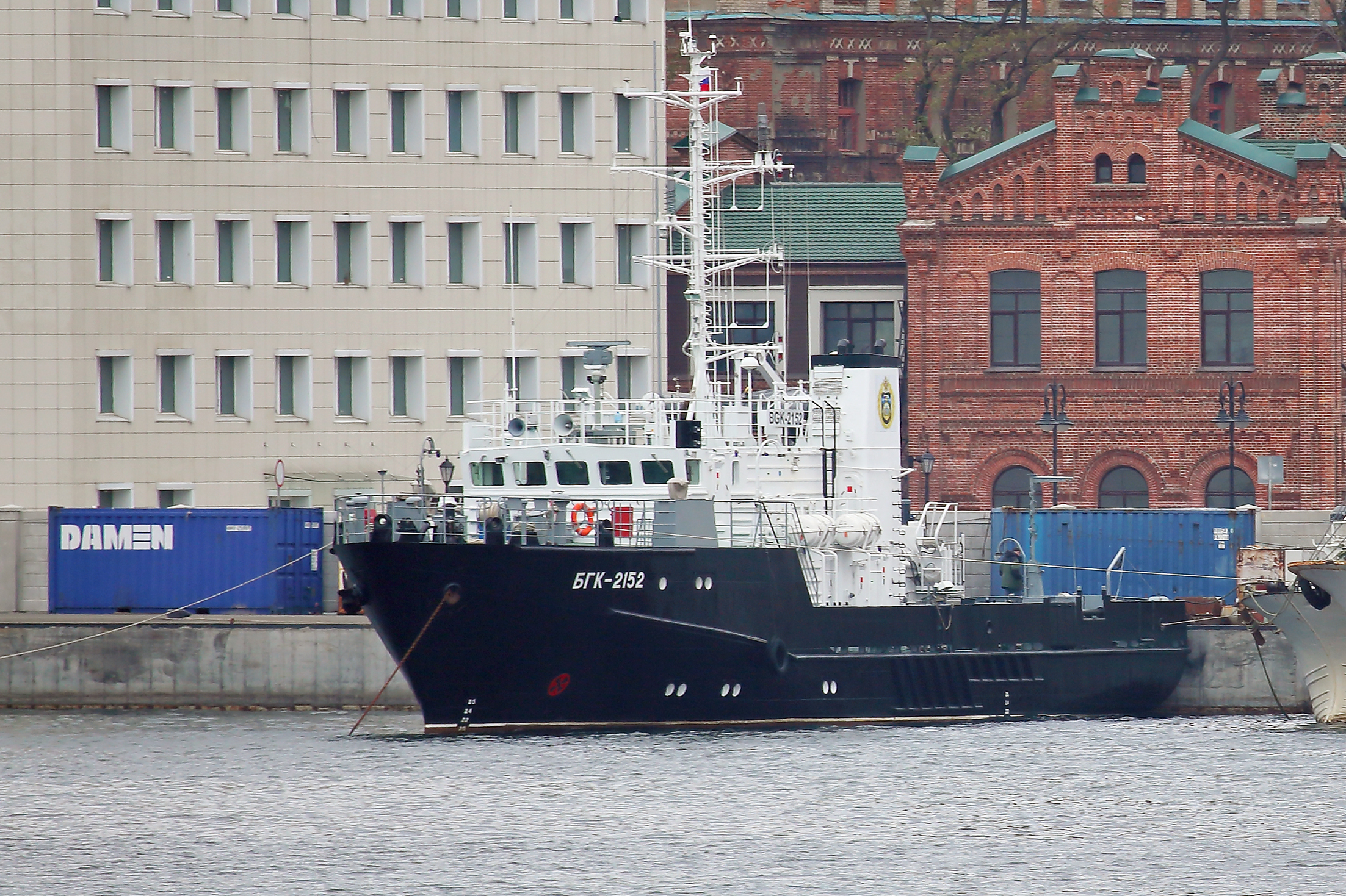 Большой гидрографический катер БГК-2152